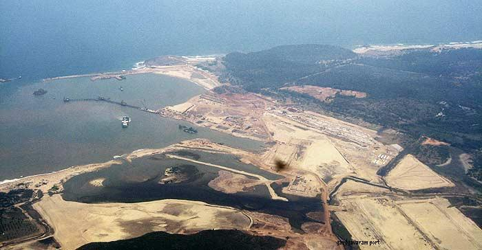 Gangavaram aerial view